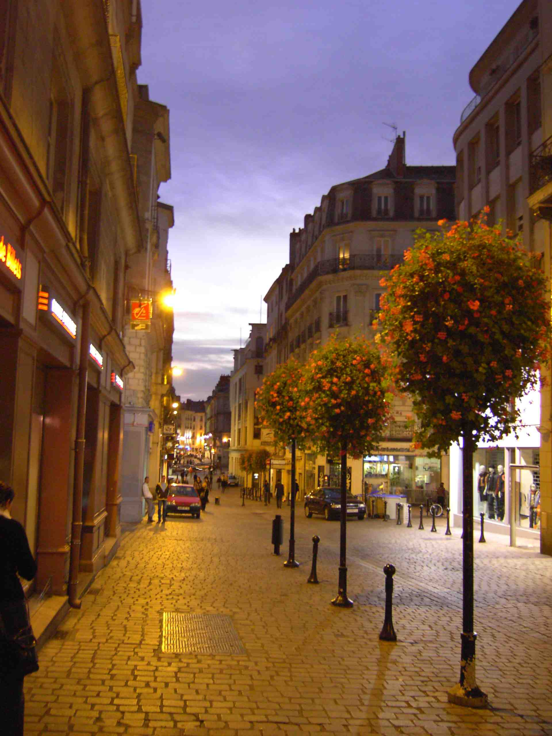 Nantes, Fußgängerzone am Abend. Fotograf: Bernd Reichelt. Aufnahme: September 2005.